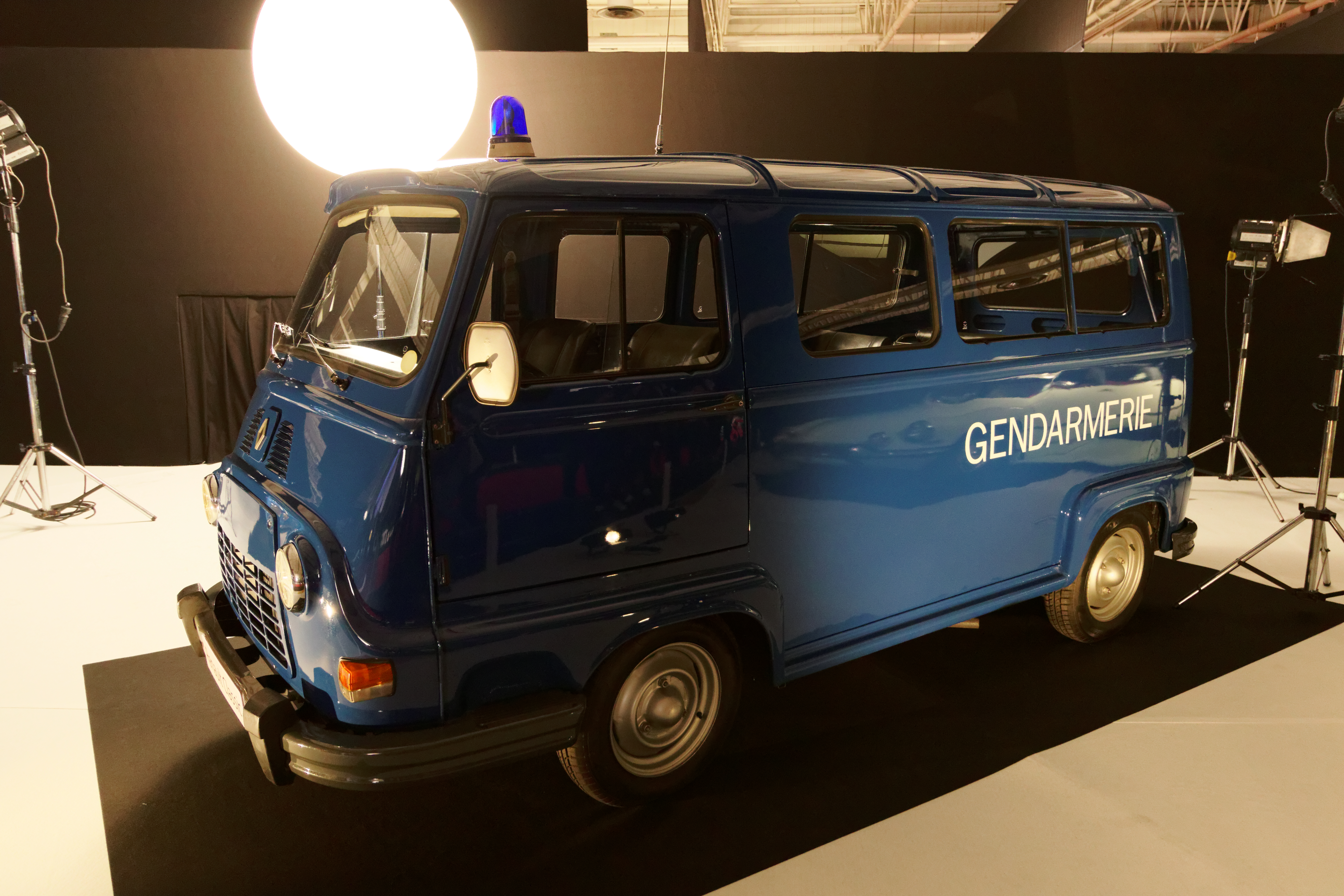 UneRenault Estafette de 1968 présentée lors du mondial de l'automobile de Paris 2016. Cette voiture est semblable à celle utilisée sur le tournage du film le gendarme se marie'.